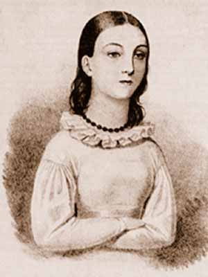 Дурова, Надежда Андреевна. Портрет Надежды Дуровой в возрасте 14 лет. Неизвестный художник